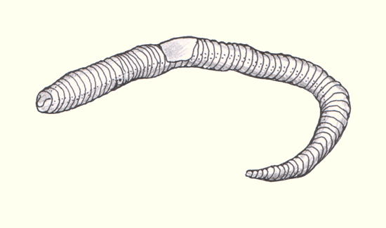 Lumbricidae